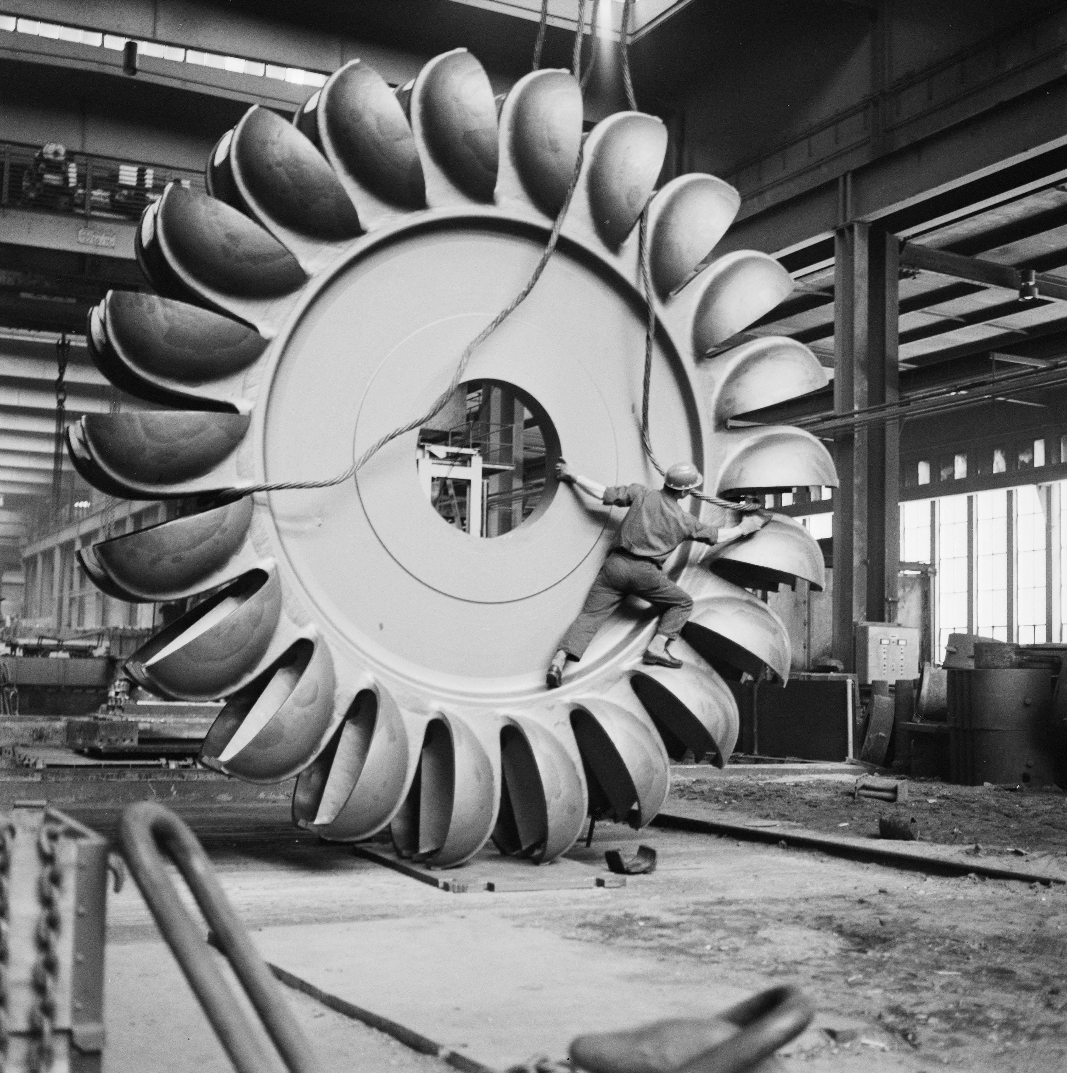 Anhängen des Peltonrades "New Colgate" zum Transport in der Stahlgiesserei der Georg Fischer AG in Schaffhausen